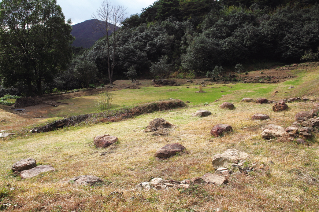 사적 제407호 광양 옥룡사지 (光陽 玉龍寺址)